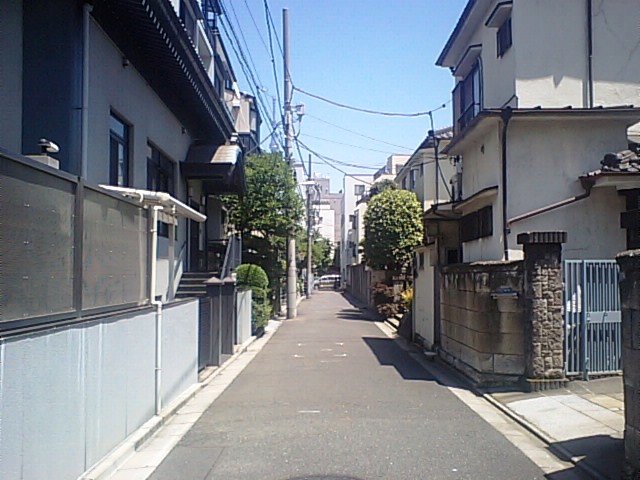 東京都台東区東上野六丁目15番付近